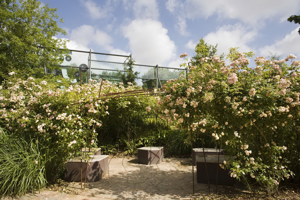 Quai Branly, pergola de rosiers-lianes